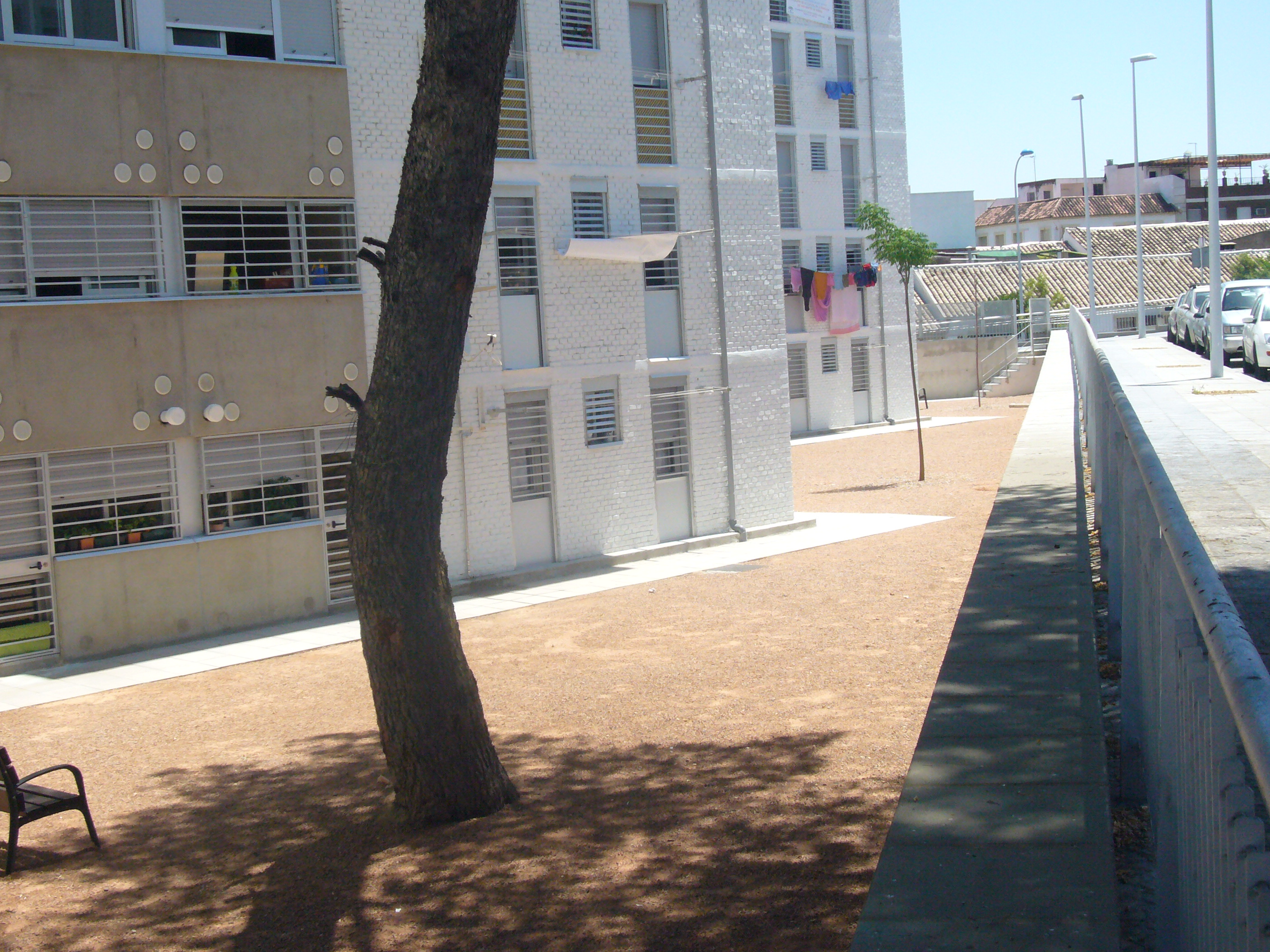 Proceso de rehabilitación del barrio San Martin de Porres (Cordoba)